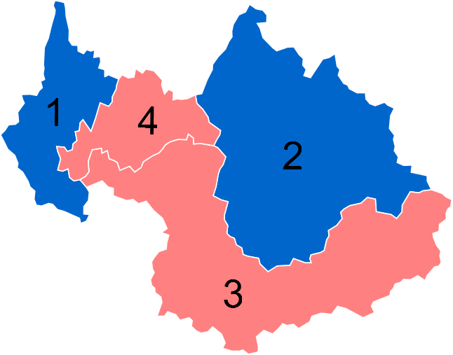 Résultats des élections législatives de Savoie en 2012